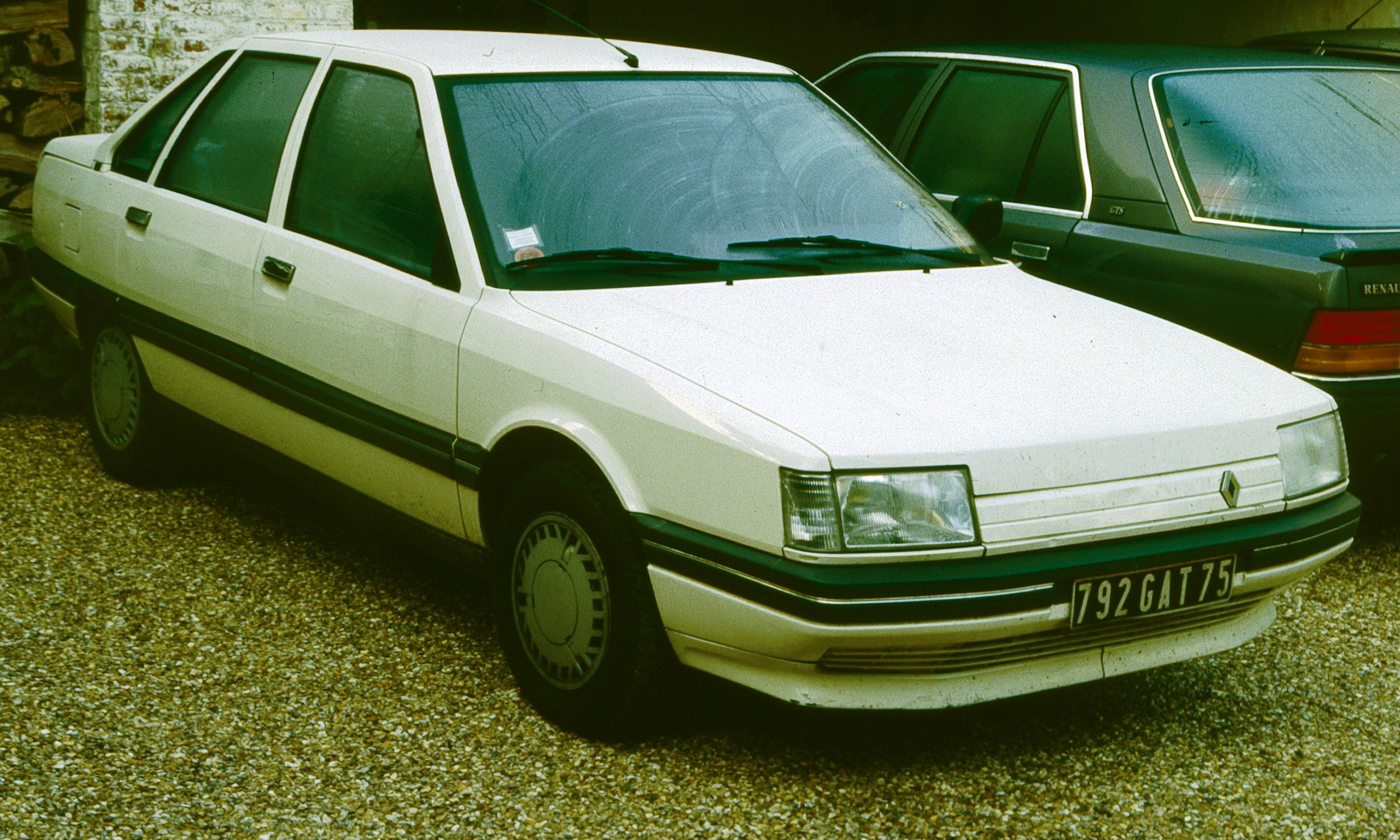 Renault 21